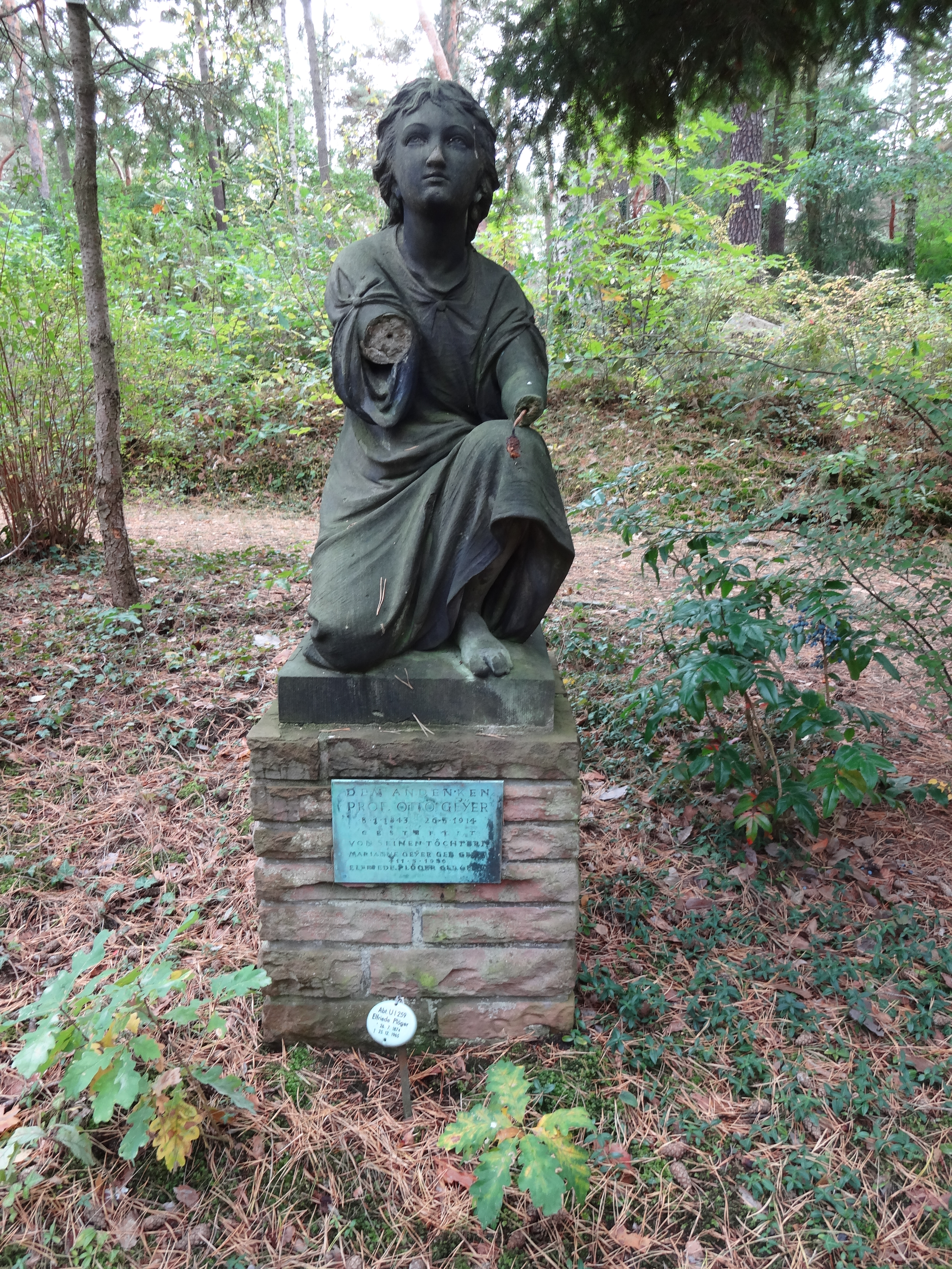 Grab von Prof. Otto Geyer auf dem Waldfriedhof Zehlendorf